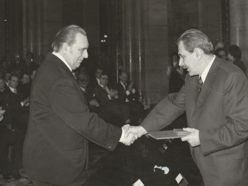 Domahidy László (1920–1996) operaénekes a Magyar Népköztársaság Érdemes Művésze díj átvételekor